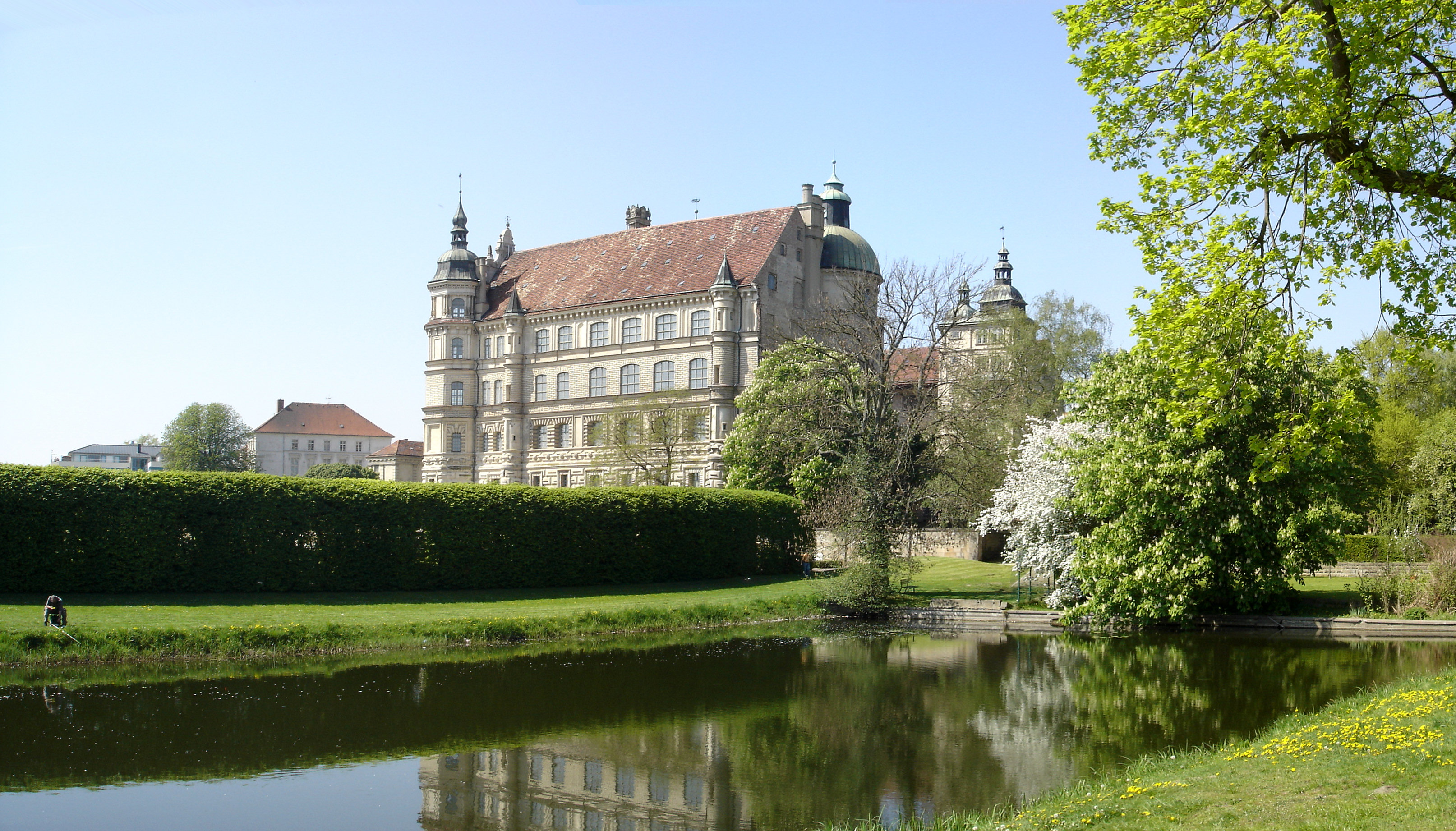 Schloss Güstrow / castle in Güstrow